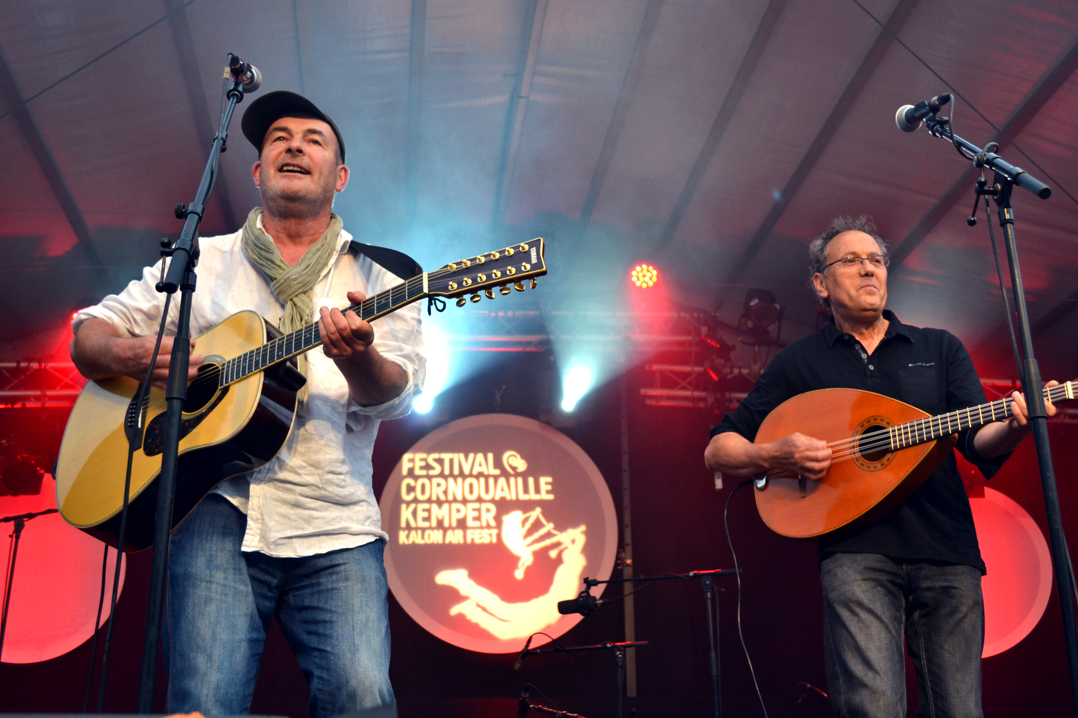 Jean-Pierre Riou et Farid Aït Siameur au festival de Cornouaille à Quimper le 26 juillet 2015.